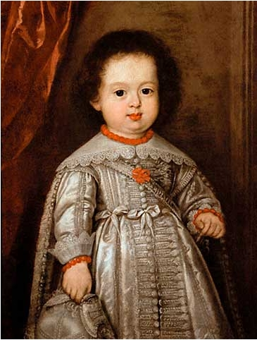 Gemälde, undat.